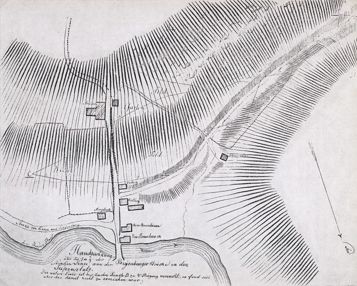 Beyenburger Brücke, Lagezeichnung der geplanten Straßenlinie von Beyenburger Brücke bis Siepenplatz von 1812. (Süden ist im Bild oben)